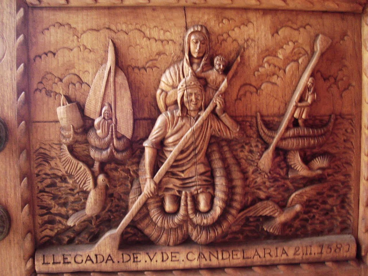 Porta da Basilica Nossa Senhora de Copacabana. Foto tirada por mim, em Copacabana.